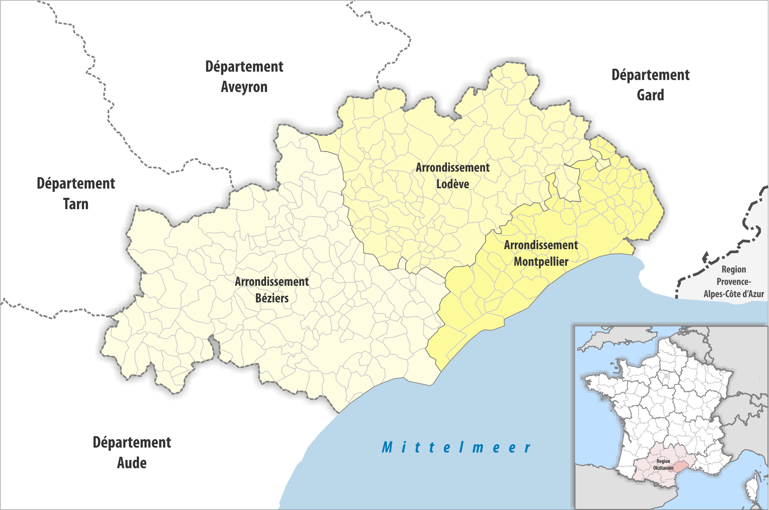 Gemeinden und Arrondissemente im Departement Hérault